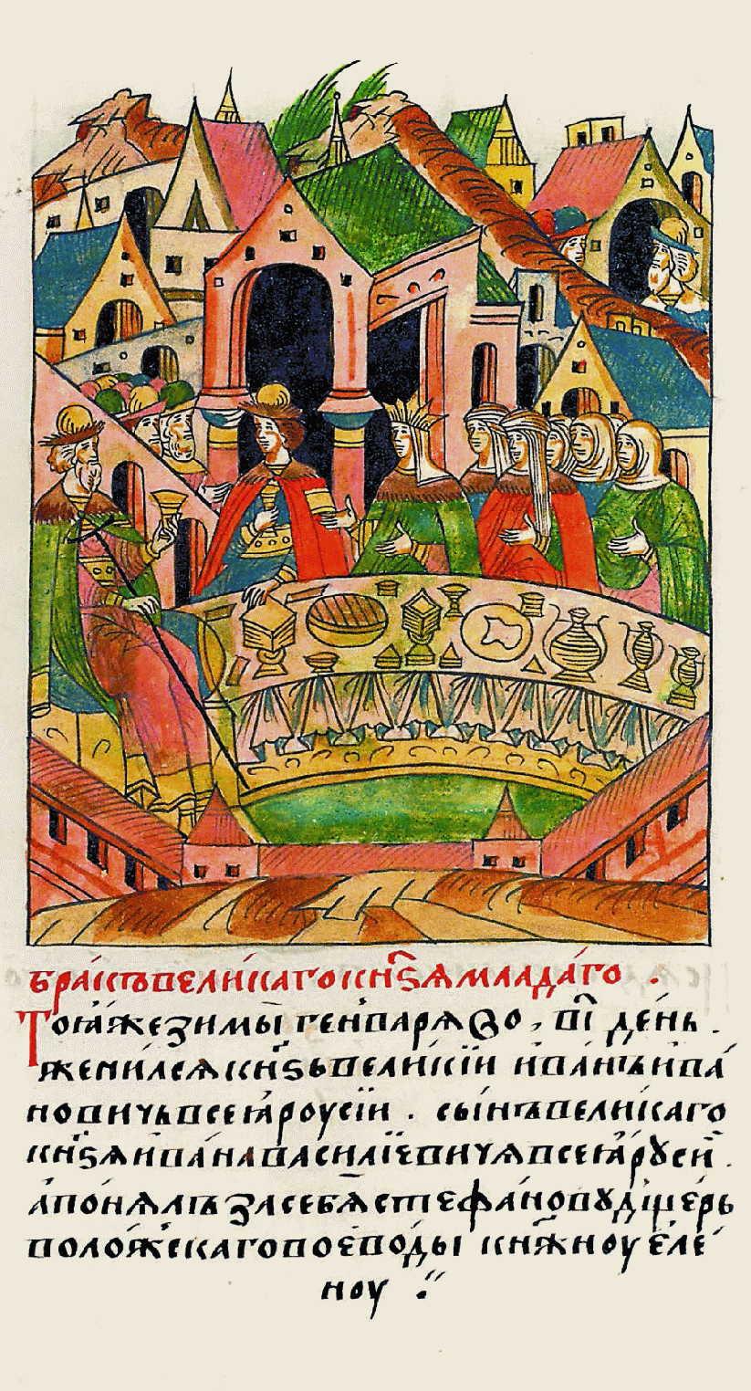 Брак великого князя Младого. В ту же зиму января в 12 день женился вели- кий князь всея Руси Иван Иванович, сын великого князя всея Руси Ивана Василье- вича, и взял за себя дочь воеводы Валаш- ского Стефана княжну Елену.